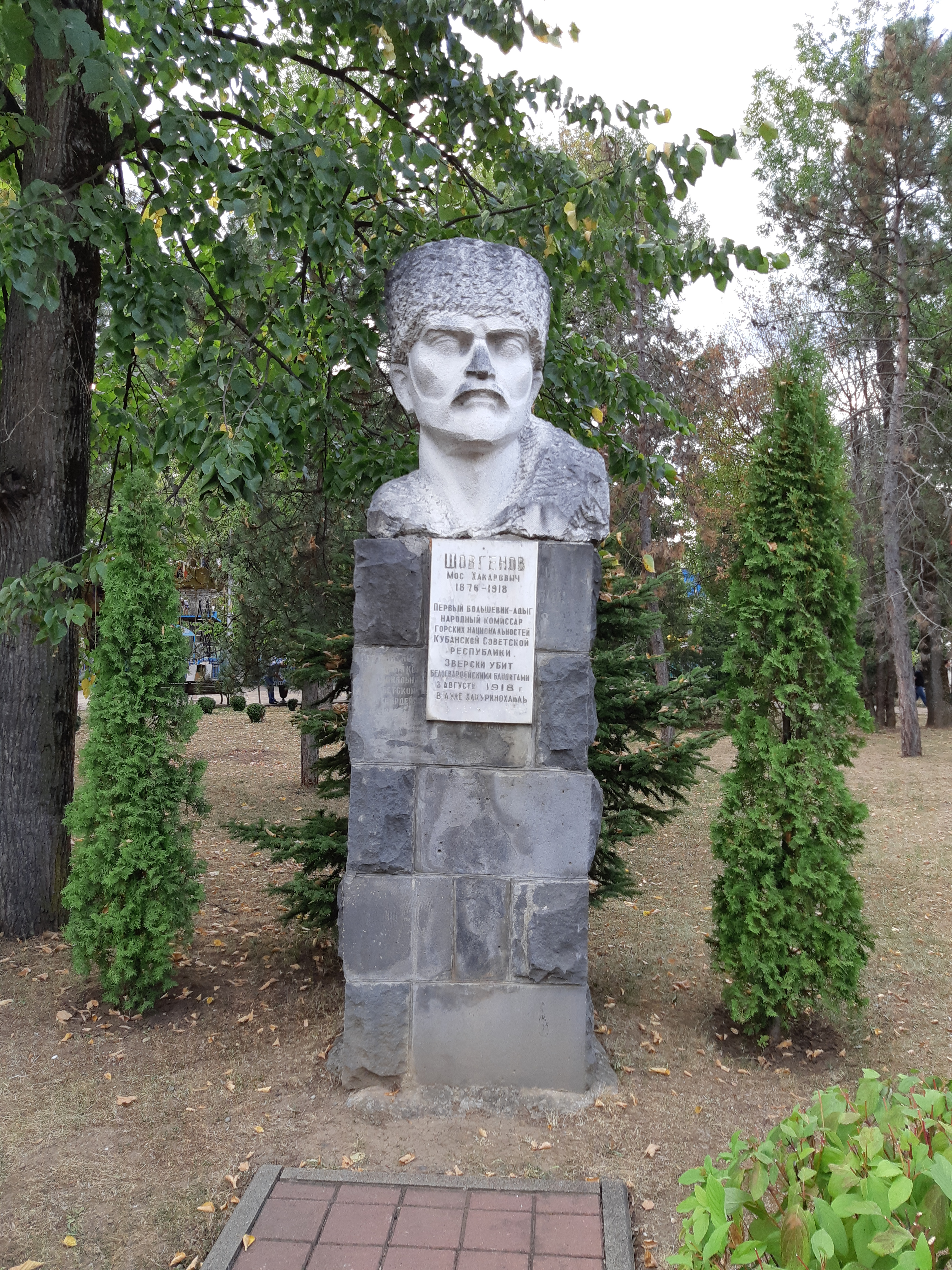 Памятник М.Х. Шовгенову, первому большевику: улица Пушкина, 181 (гор. парк им. Горького), Майкоп, Адыгея